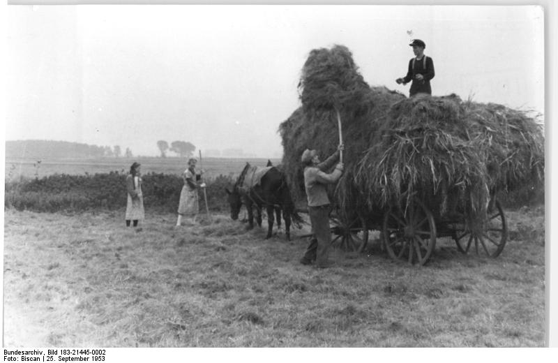 Ummendorf, Futterente, Verladen Zentralbild Biscan 25.9.1953 1000 ha Kulturland werden gewonnen. Dank der großzügigen Hilfe unserer Regierung, die bisher 800.000 DM zur Verfügung gestellt hat, kann der sogenannte Seelsche Bruch in der Nähe von Eilsleben trockengelegt werden. Zu diesem Zweck werden 70 cm tiefe Gräben durch den ganzen Bruch gezogen und Drainröhren in einer Gesamtlänge von 610 km gelegt. Durch dieses Binnenentwässerung werden 1000 ha Moorwiesen, die mehr als 400 Bauern und Volksgütern der Umgebung gehören, in fruchtbaren Ackerboden verwandelt. UBz: Der werktätige Einzelbauer Willi Meyer aus Ummendorf, der hier mit seiner Familie im Seelschen Bruch Futter einhlt, ist einer der Bauern, die im Seelschen Bruch Ländereien haben. Meyer hat einen halben Hektar und kann nur etwas Futter ernten. Dank der grßzügigen Entwässerungsmaßnahmen unserer Regierung wird sich auch sein Boden in wertvollen Ackerboden verwandeln.